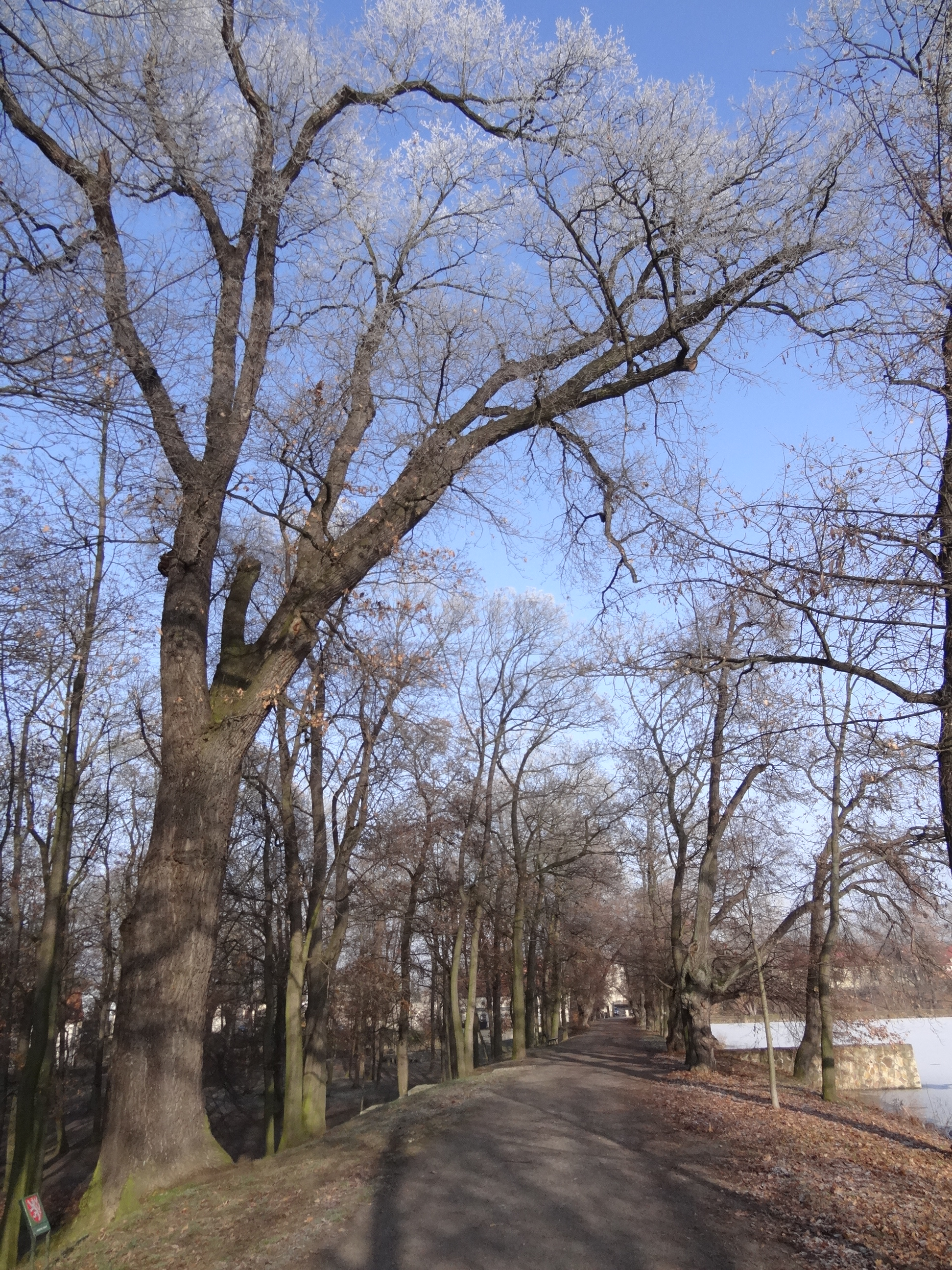 Dolní Počernice - skupina památných dubů letních na hrázi Počernického rybníka